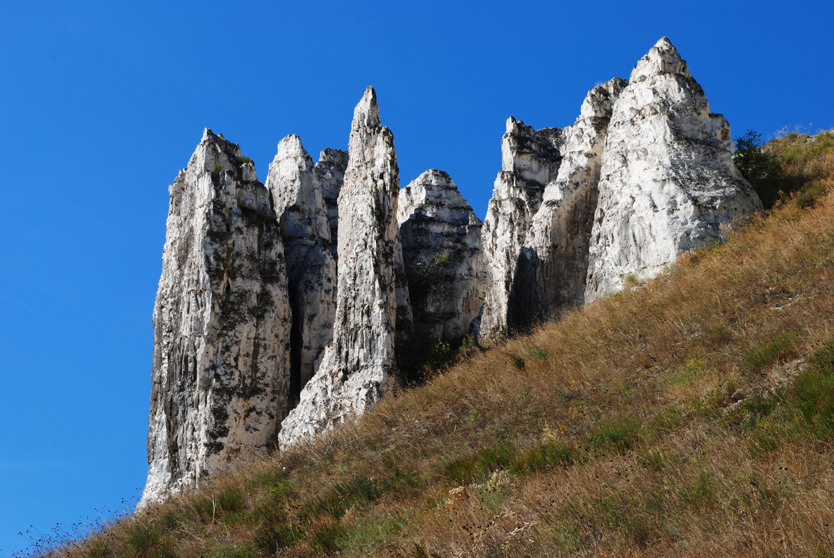 Скалообразное обнажение верхнего мела — геологический памятник природы. Возраст меловой горы — 90 миллионов лет. Гора состоит из отложений последнего периода мезозойской эры, которые сформировались в чистых тёплых морских водах из небольших морских организмов с известковым скелетом.